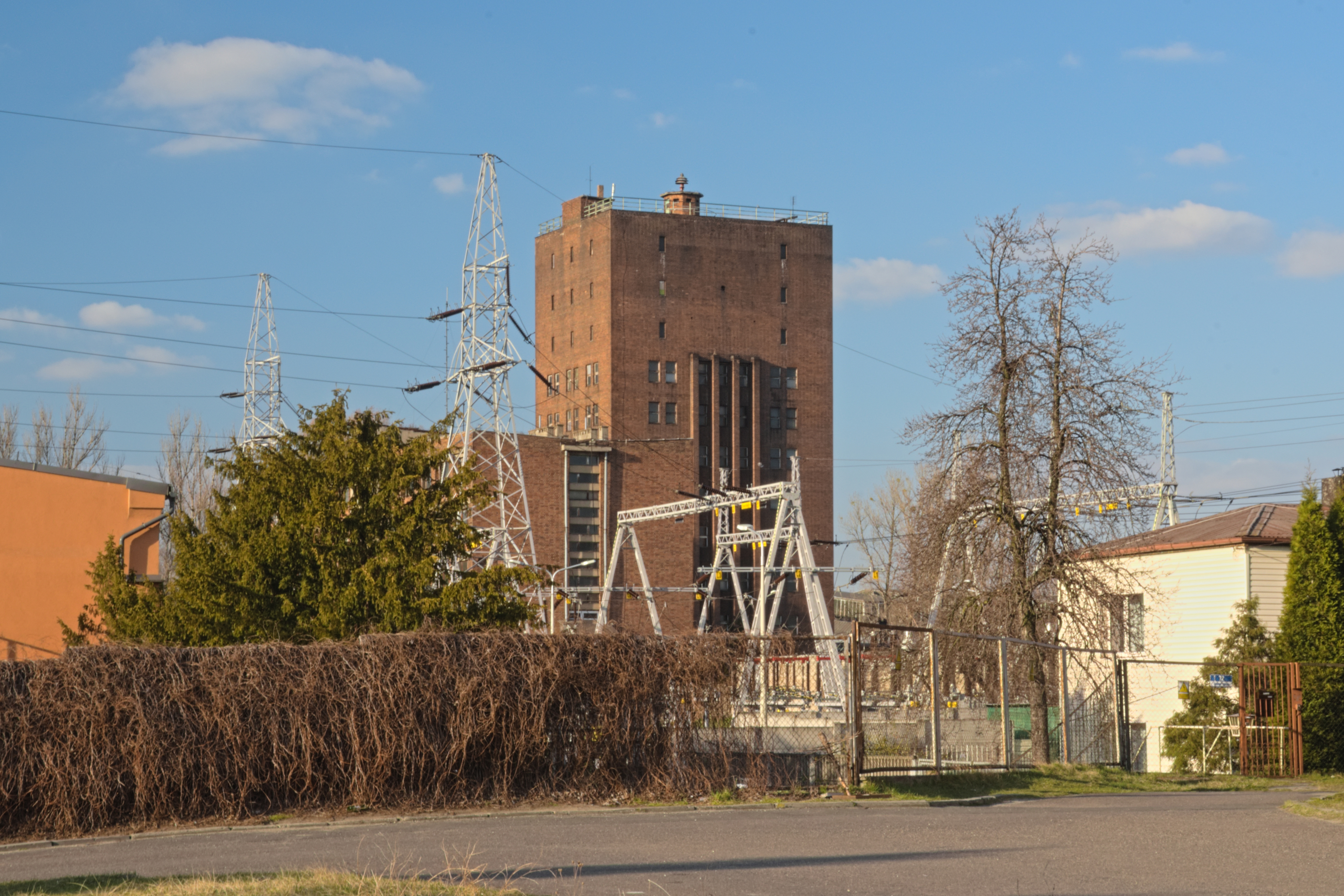 budynek dyrekcji pełniący rolę wieży ciśnień na terenie zakładów Bumar Łabędy w Gliwicach